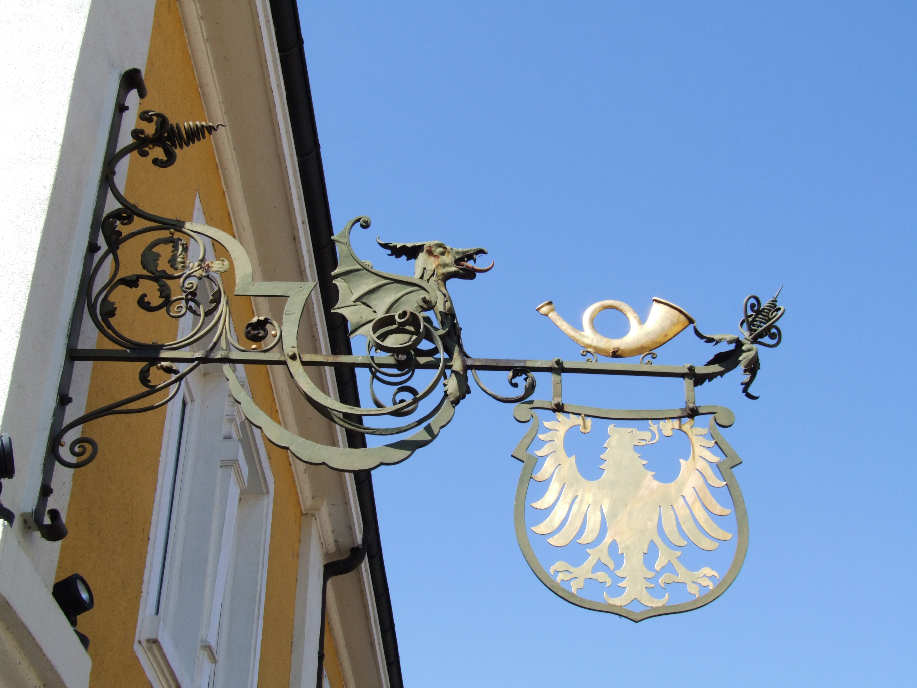 Nasenschild eines Hotels, "Adler", , Deutschland